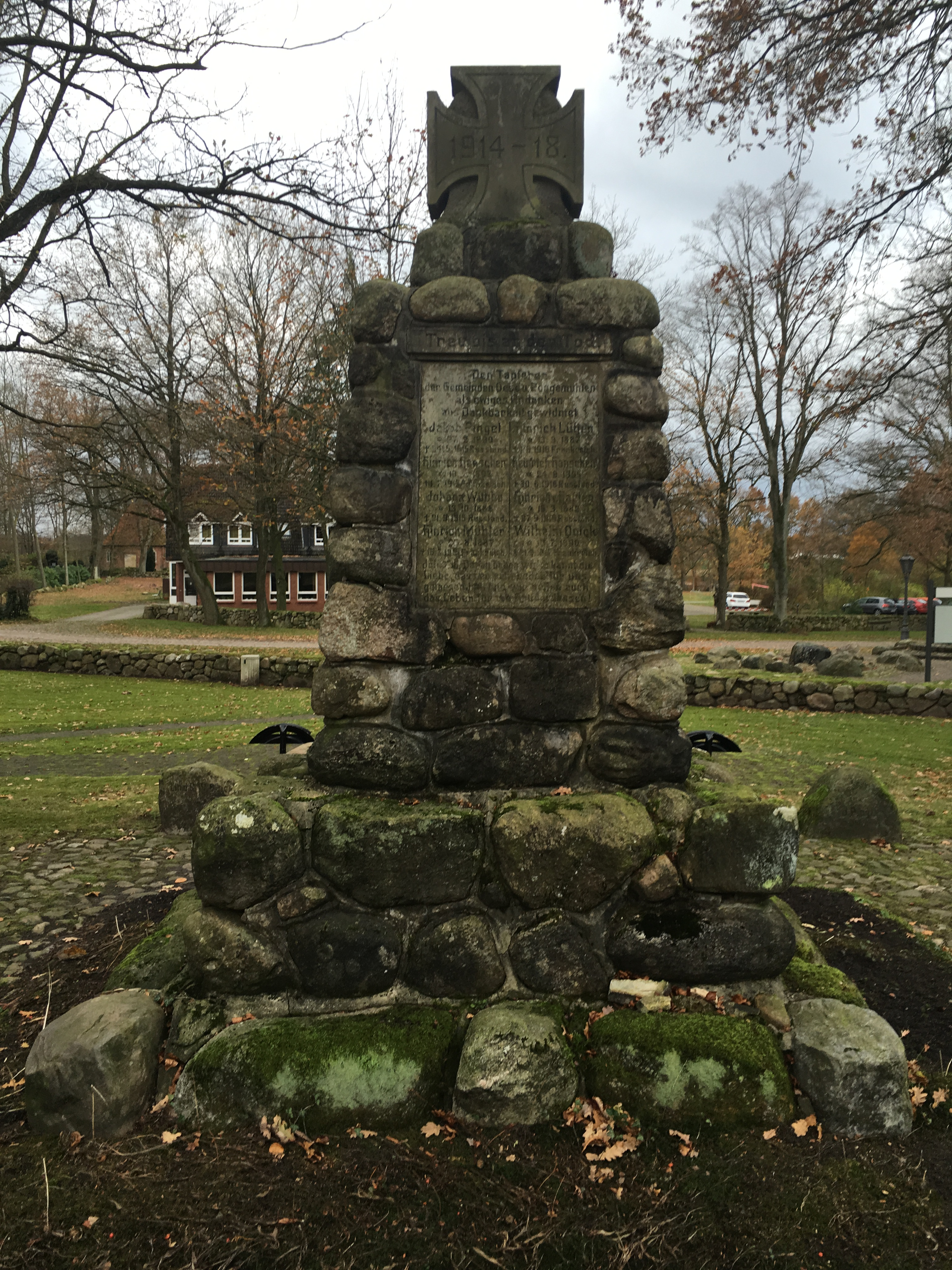 Denkmaal för de Fullenen in Öös